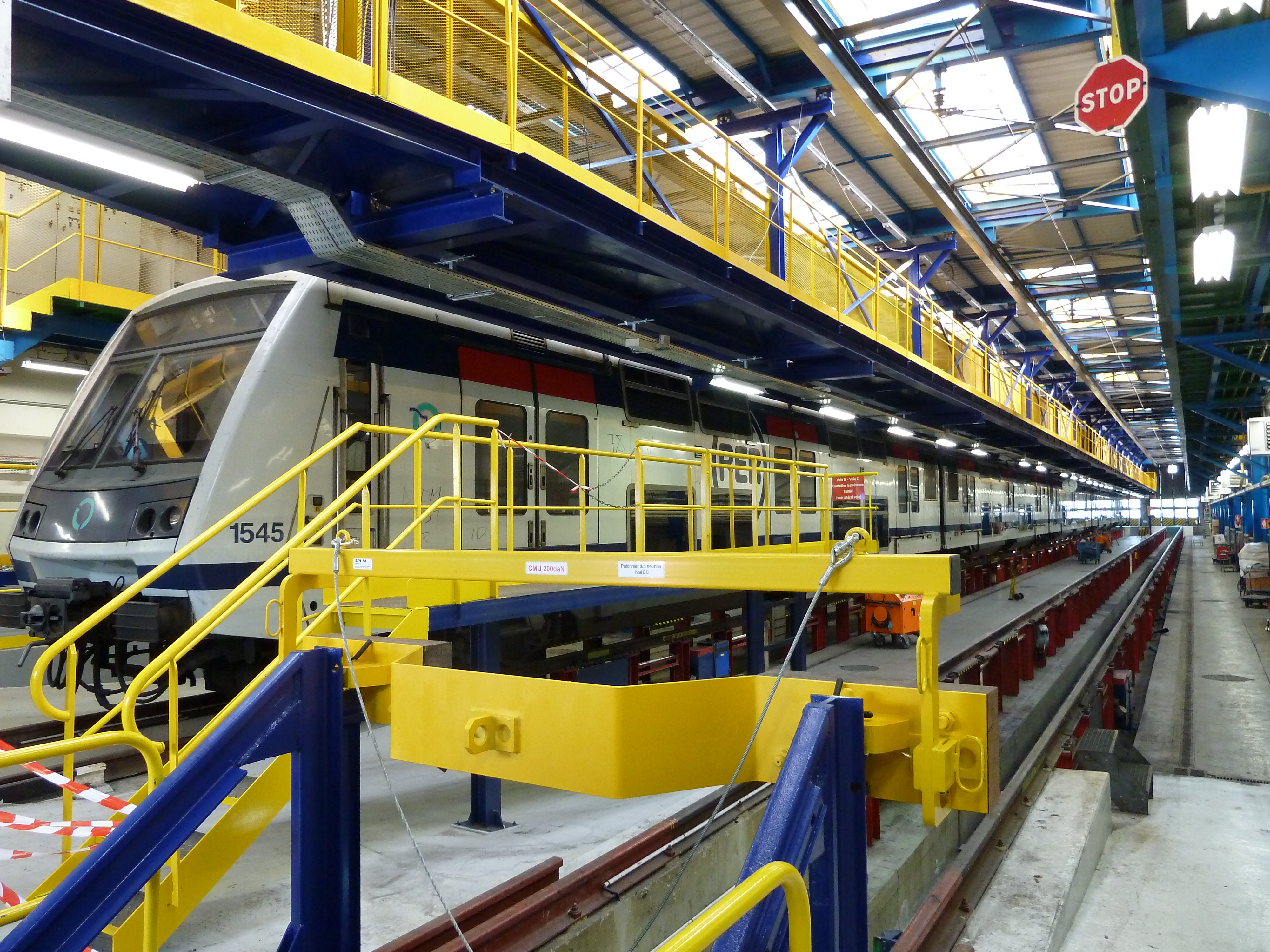 MI2N Altéo en visite fosse/toit à l'atelier de Sucy / Journées européennes du patrimoine 2010